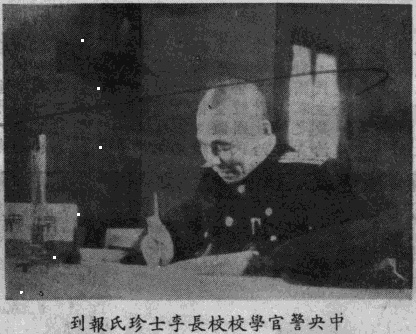 第一屆國民大會 中央警官學校校長李士珍報到